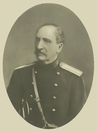 Трубецкой Александр Васильевич - российский военный деятель